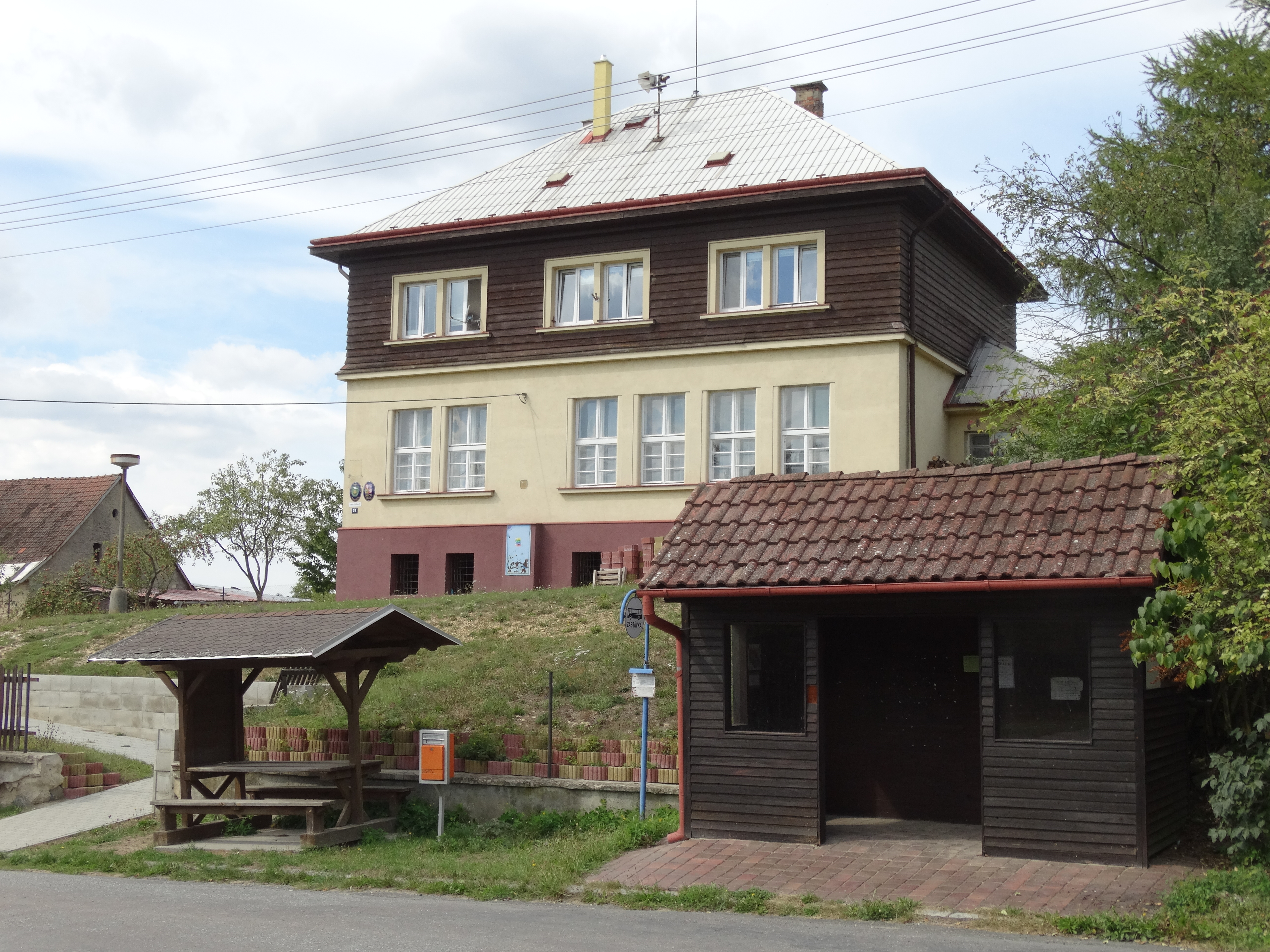 Želivsko